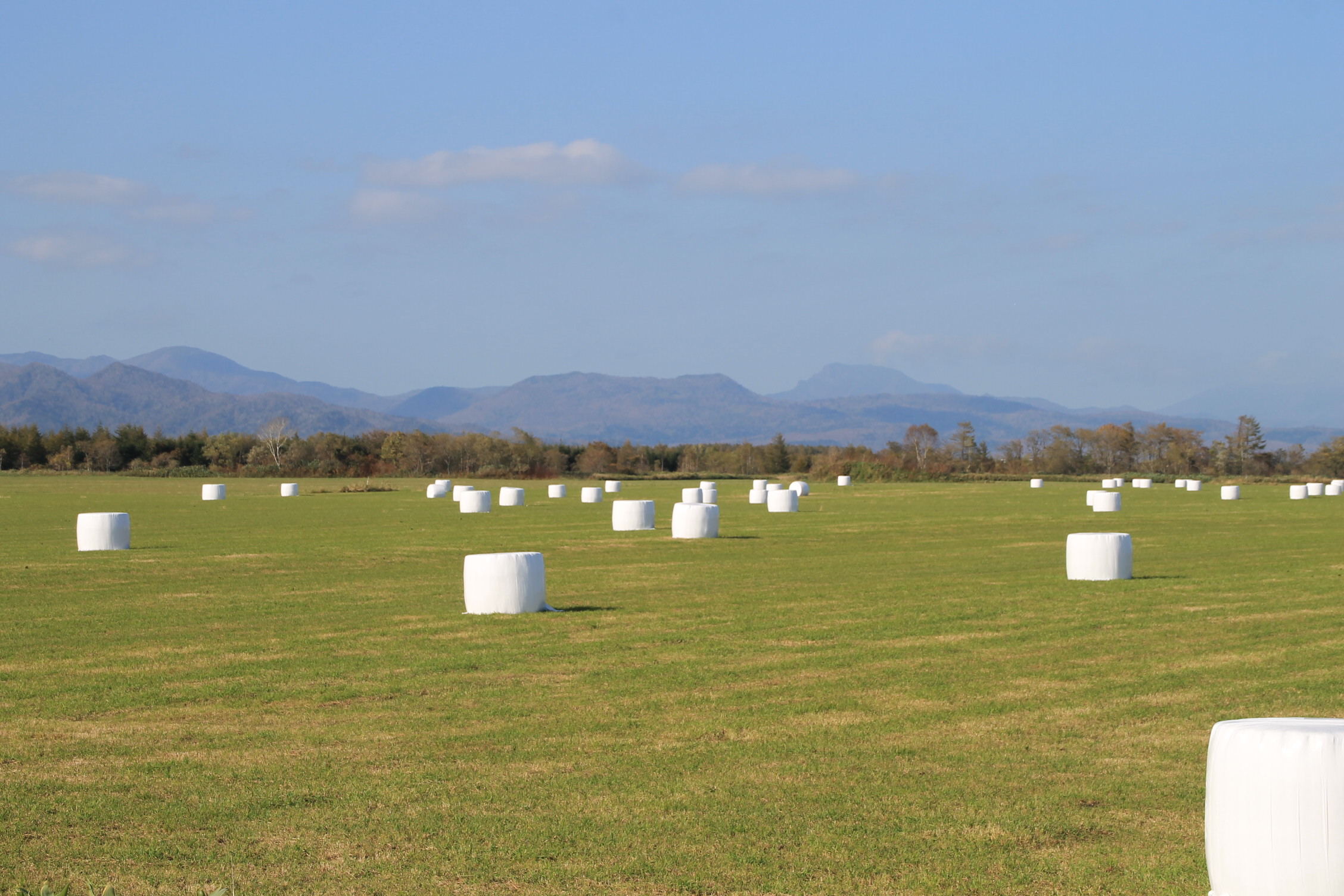 広いよね（Large field）